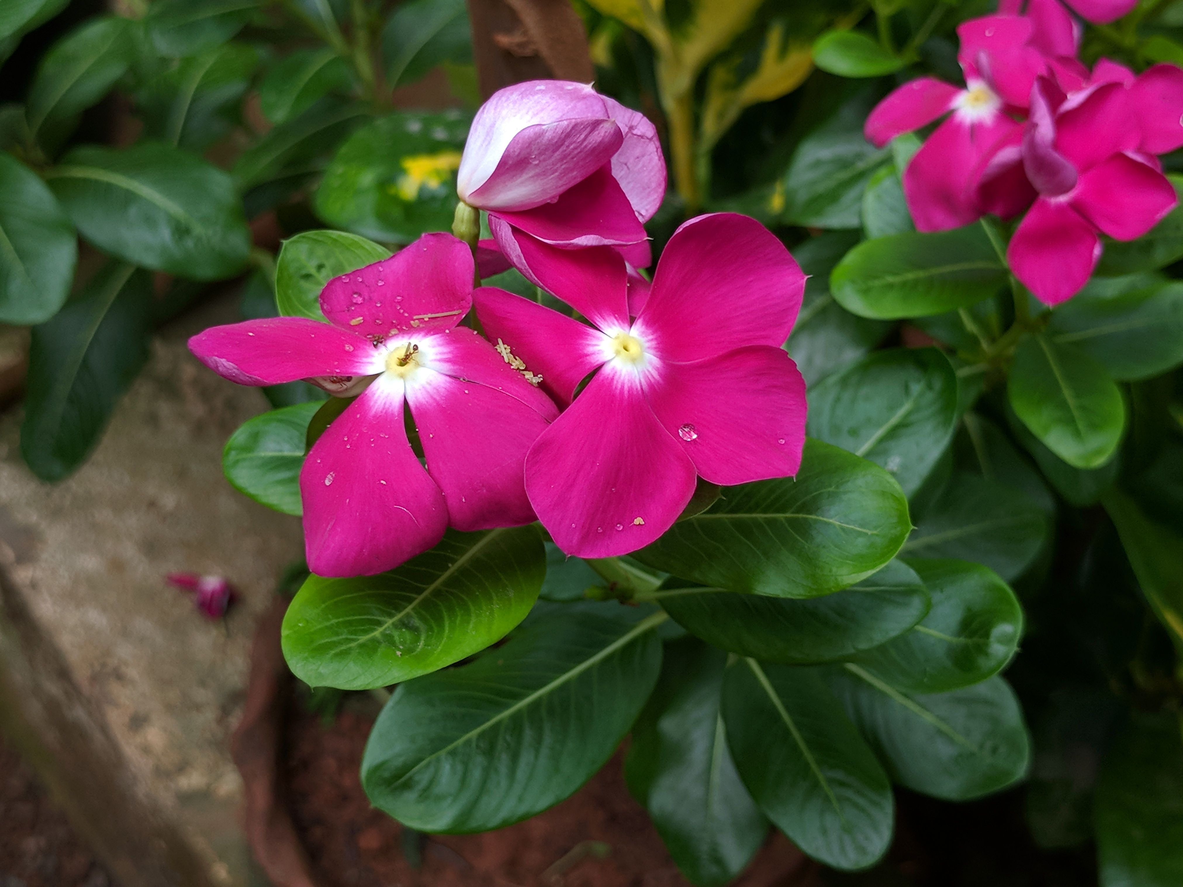 kkds